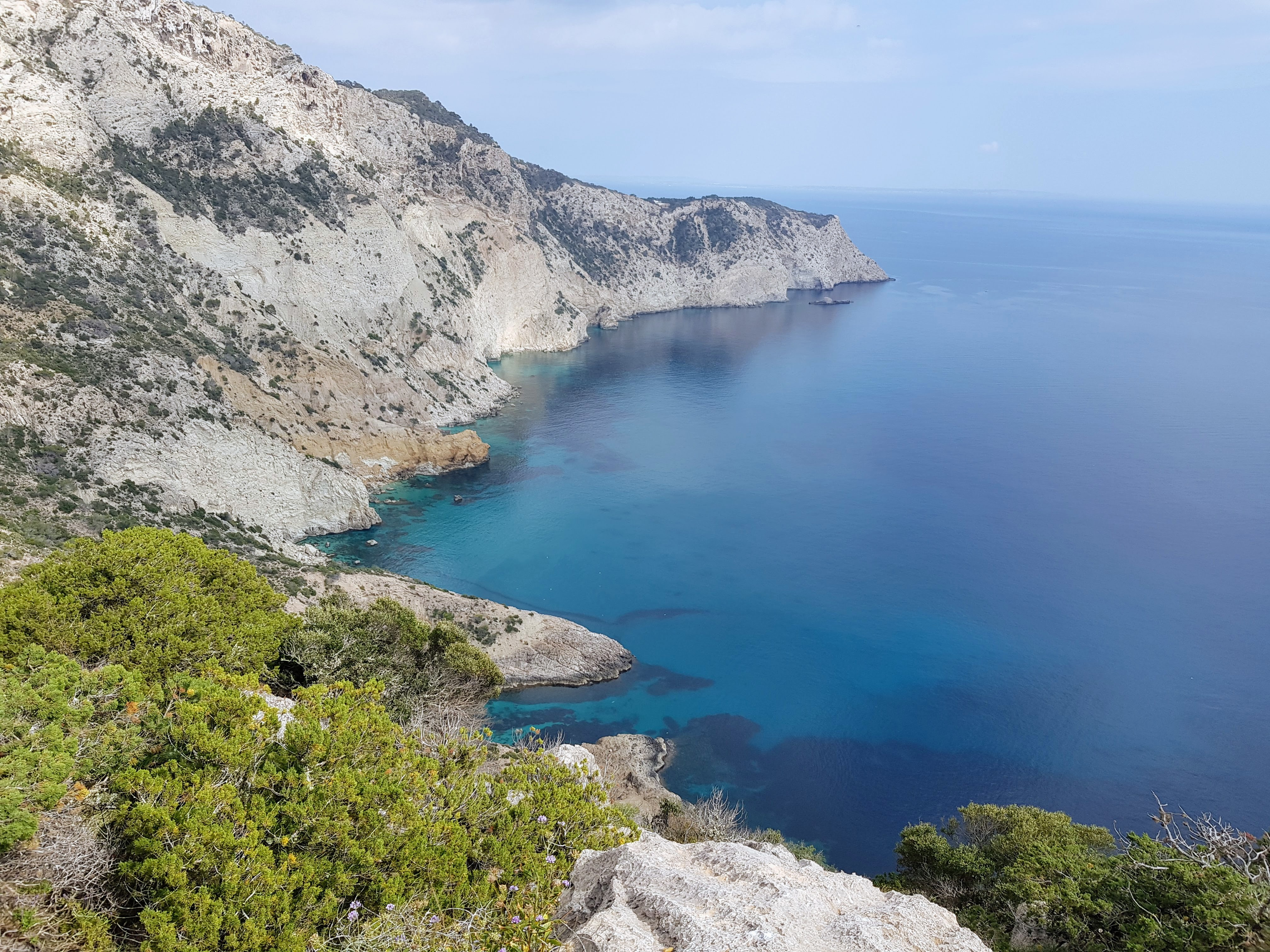 Cap Llentrisca - Sa Talaia This is a photography of a Special Area of Conservation in Spain with the ID: ES5310032. Natura2000 entry, EEA entry